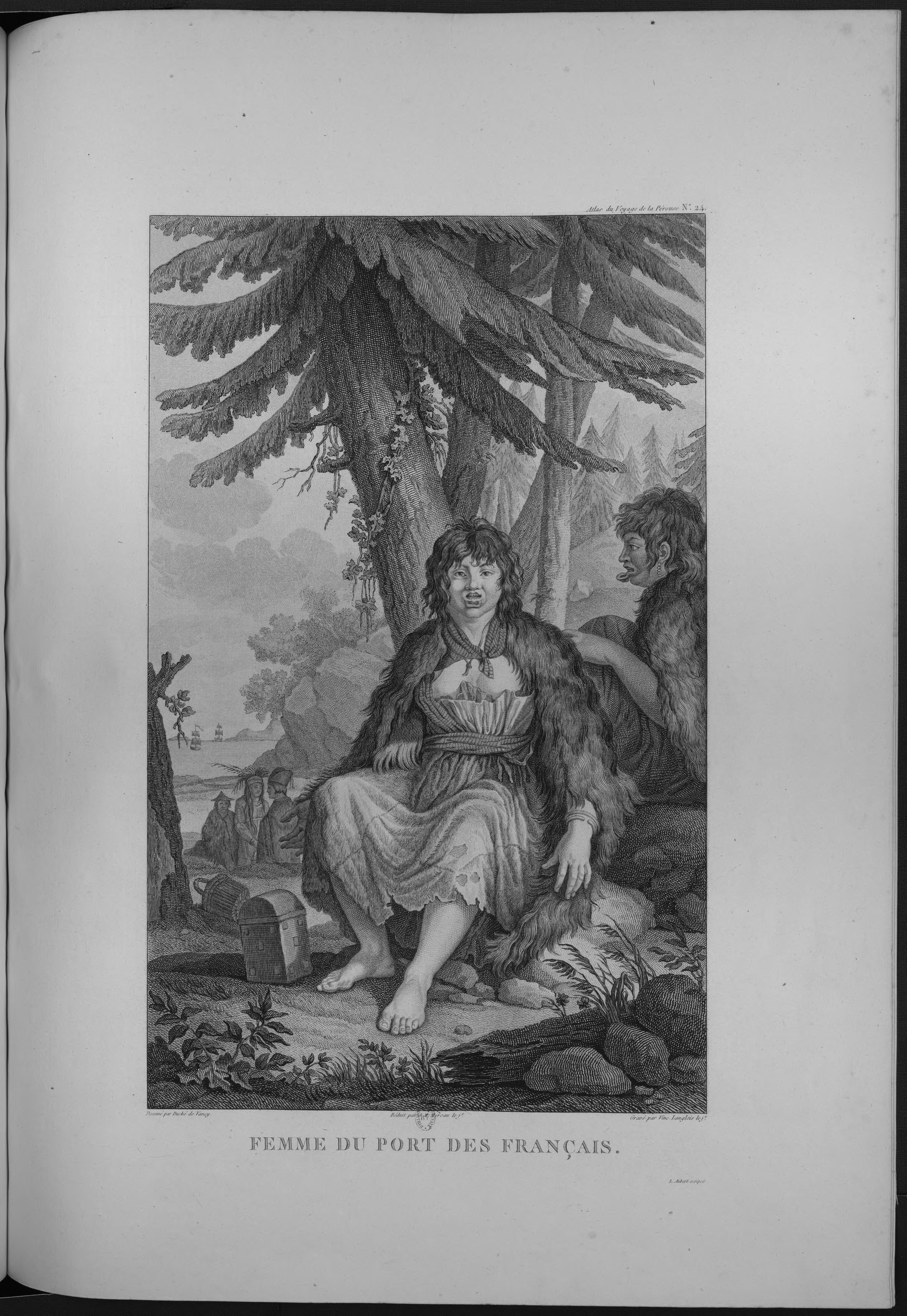 Atlas du voyage de La Pérouse